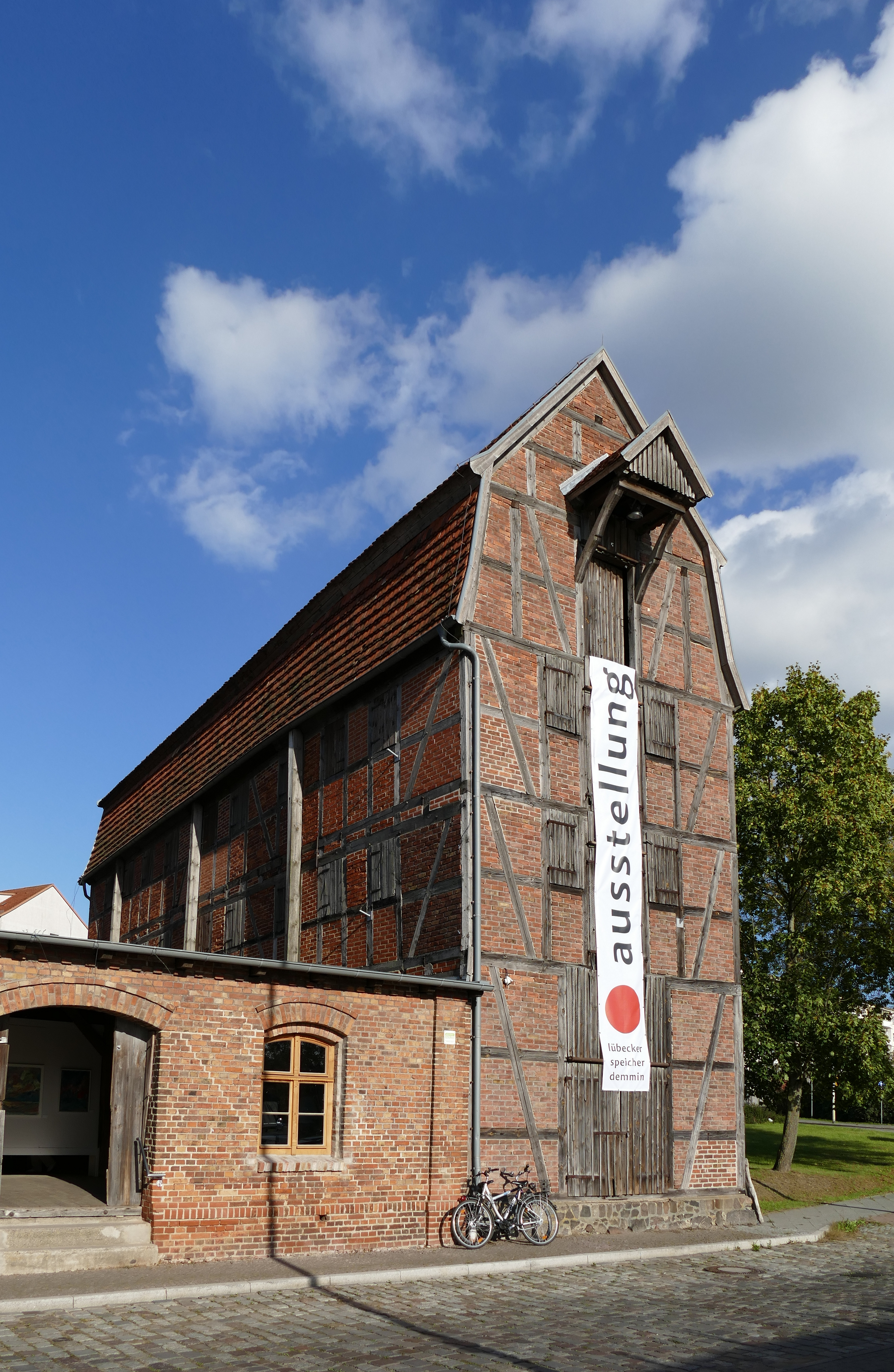 Lübecker Speicher in Demmin, Ansicht vom Hafen